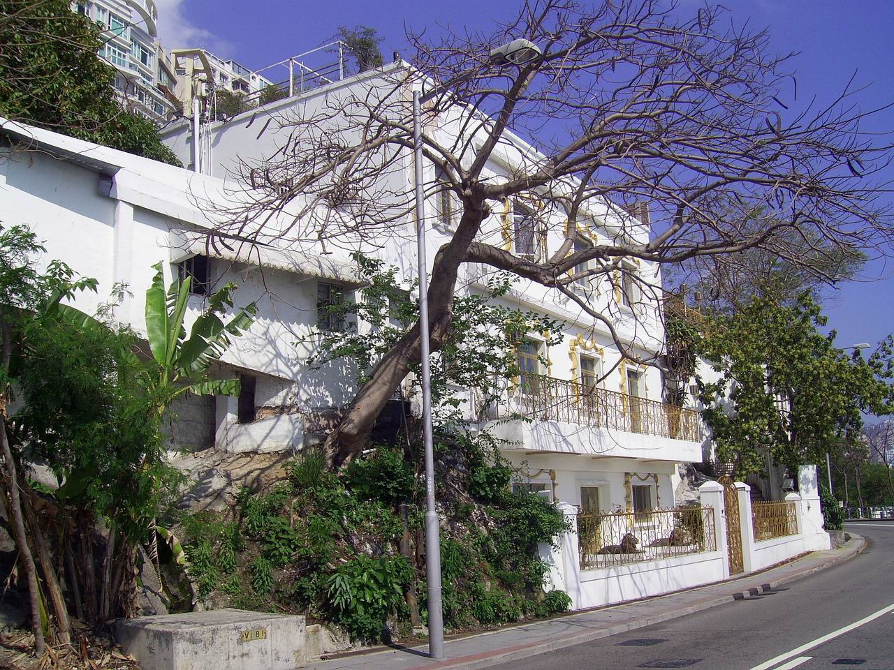 摩星嶺黃金屋